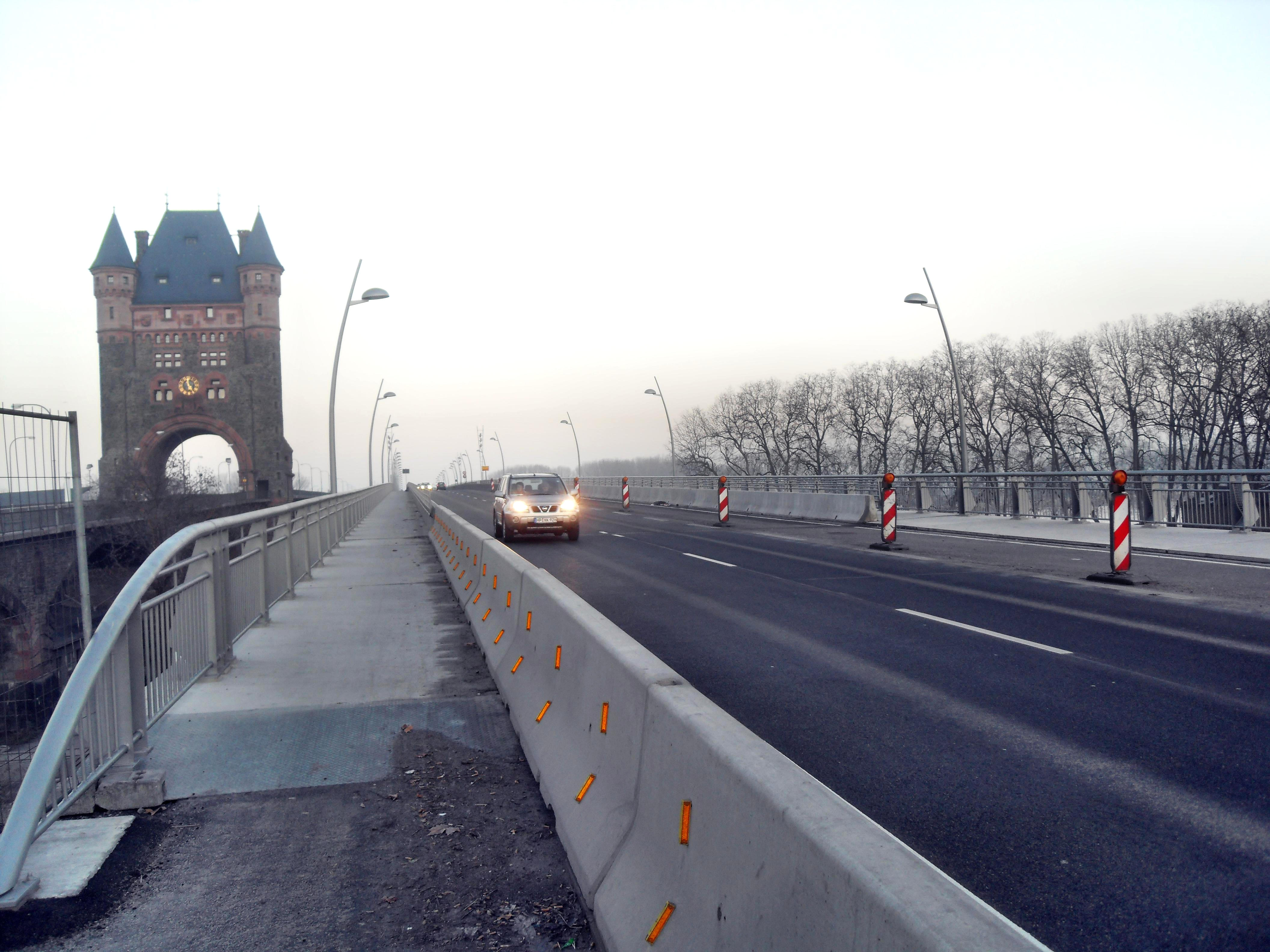 Neue Brücke neben der Nibelungenbrücke über den Rhein nach Hessen bei Worms